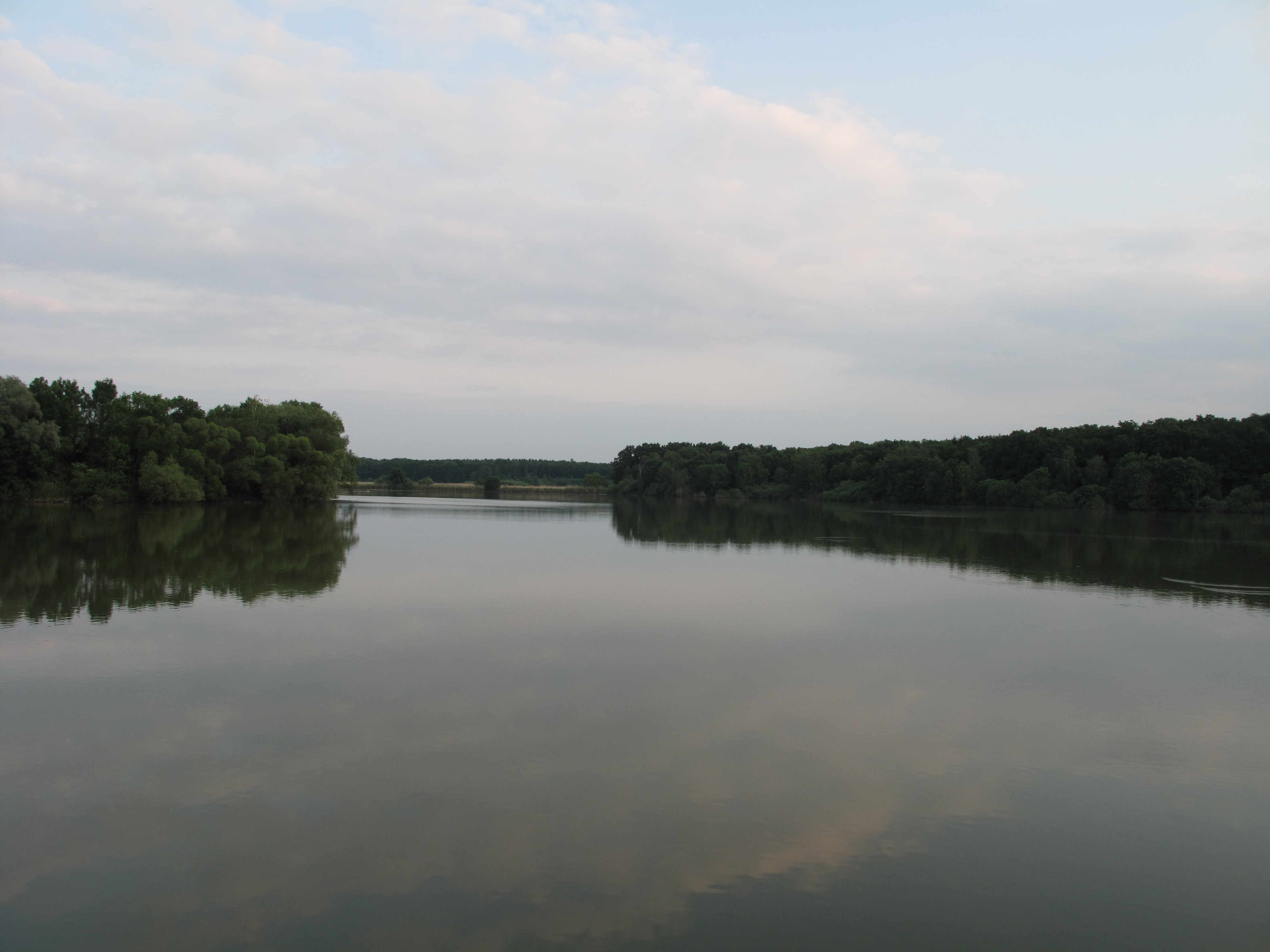 Hladina rybníka Vražda. Okres Nymburk, Česká republika.